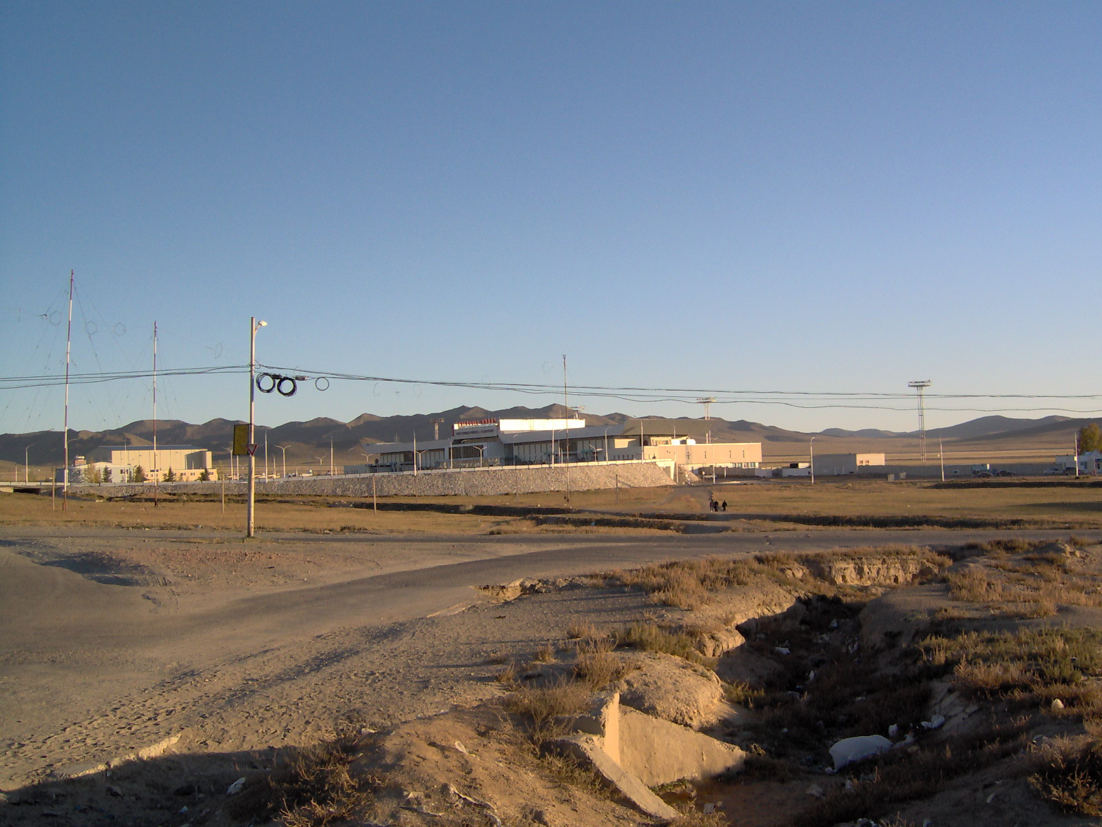 Airport, Ulaanbaatar